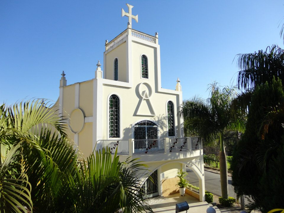 Igreja de Nossa Senhora Aparecida em Itatiba, durante um belo dia.